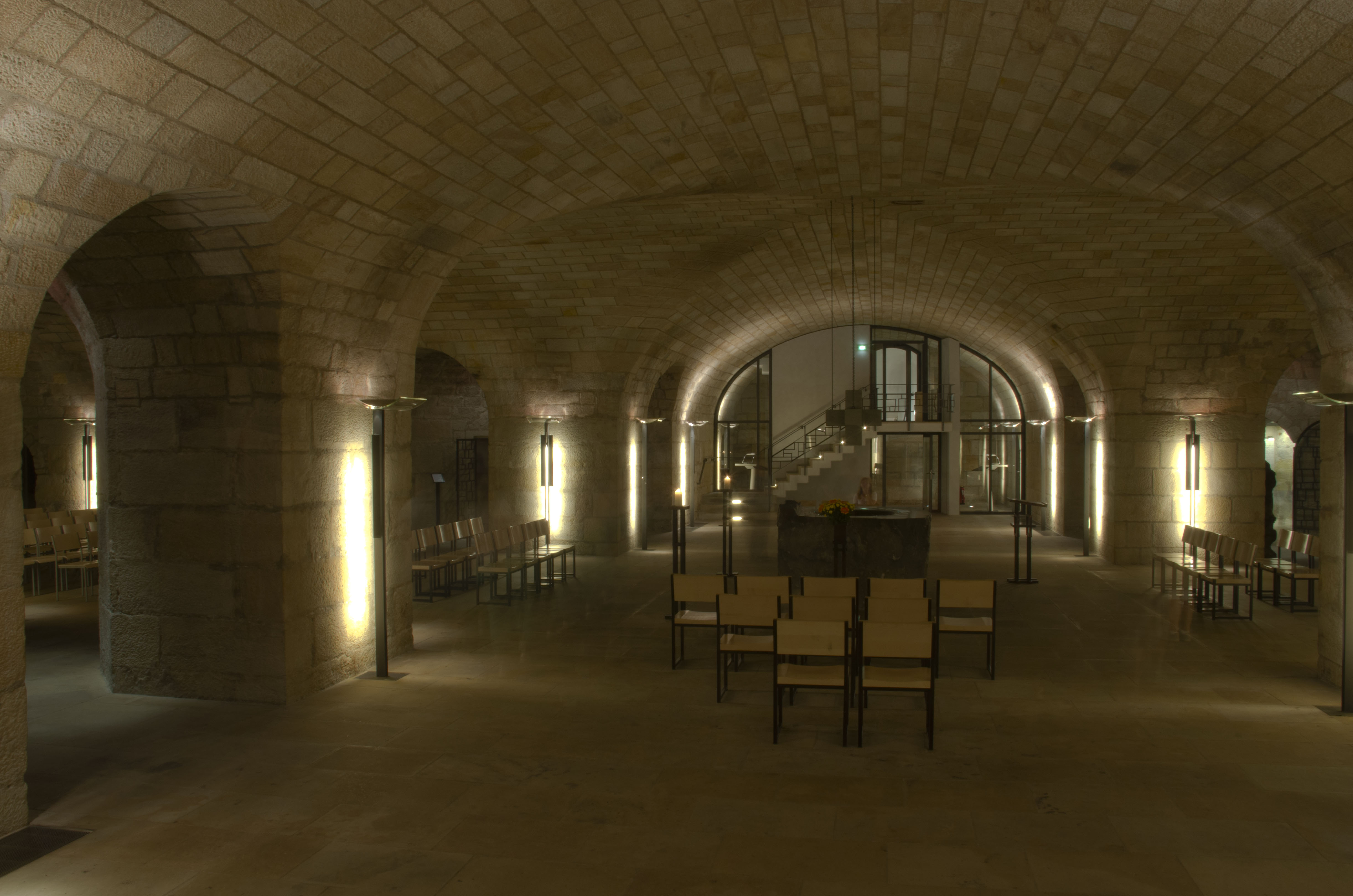 Frauenkirche Dresden, Unterkirche